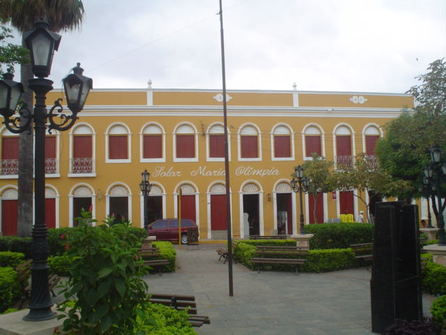 Centro da cidade de Barbalha, Ceará - Brasil; Fotografia tirada em 2006.